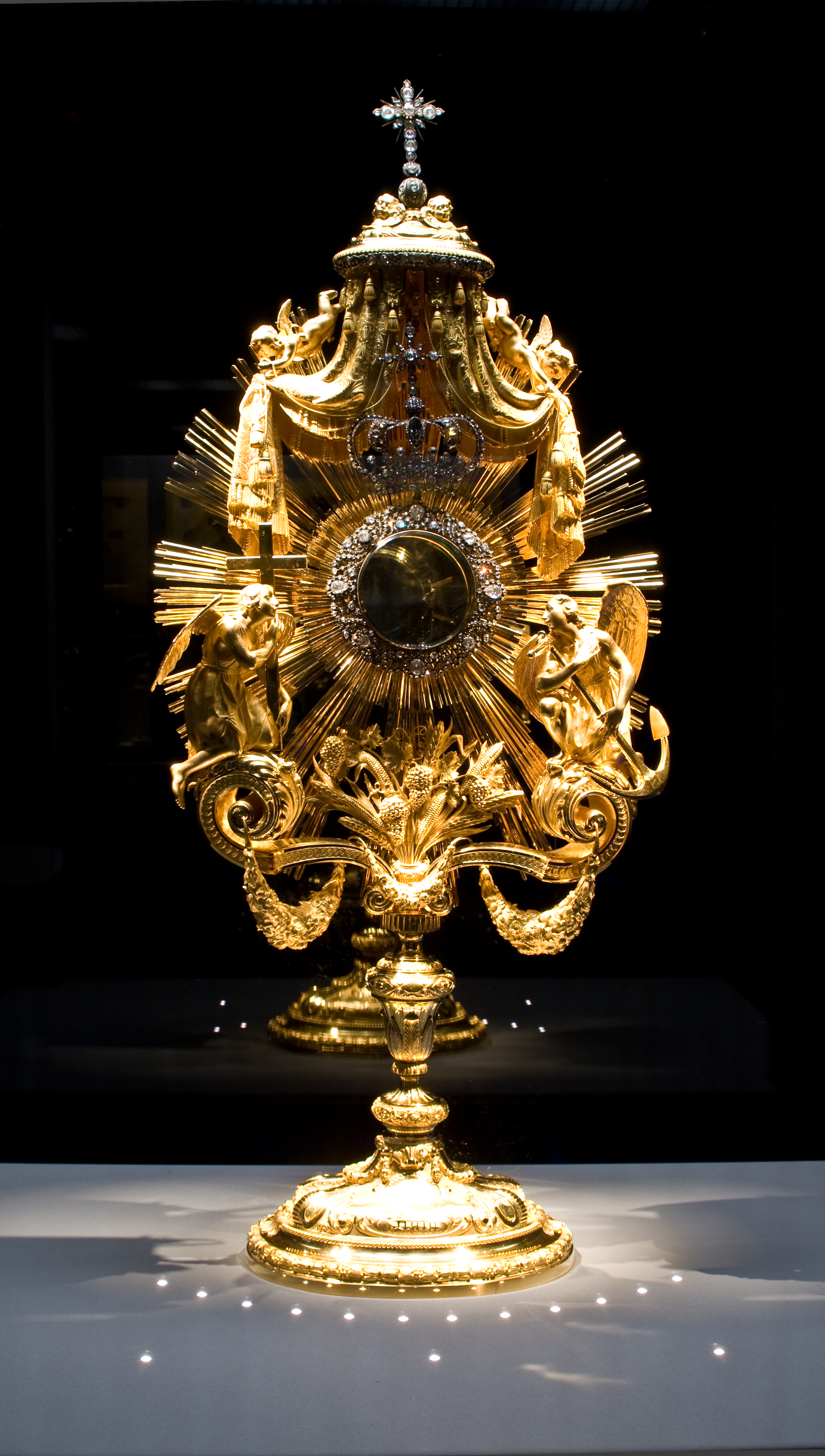 Monstrans, Jan Pieter Anton Verschuylen, Antwerpen, 1841